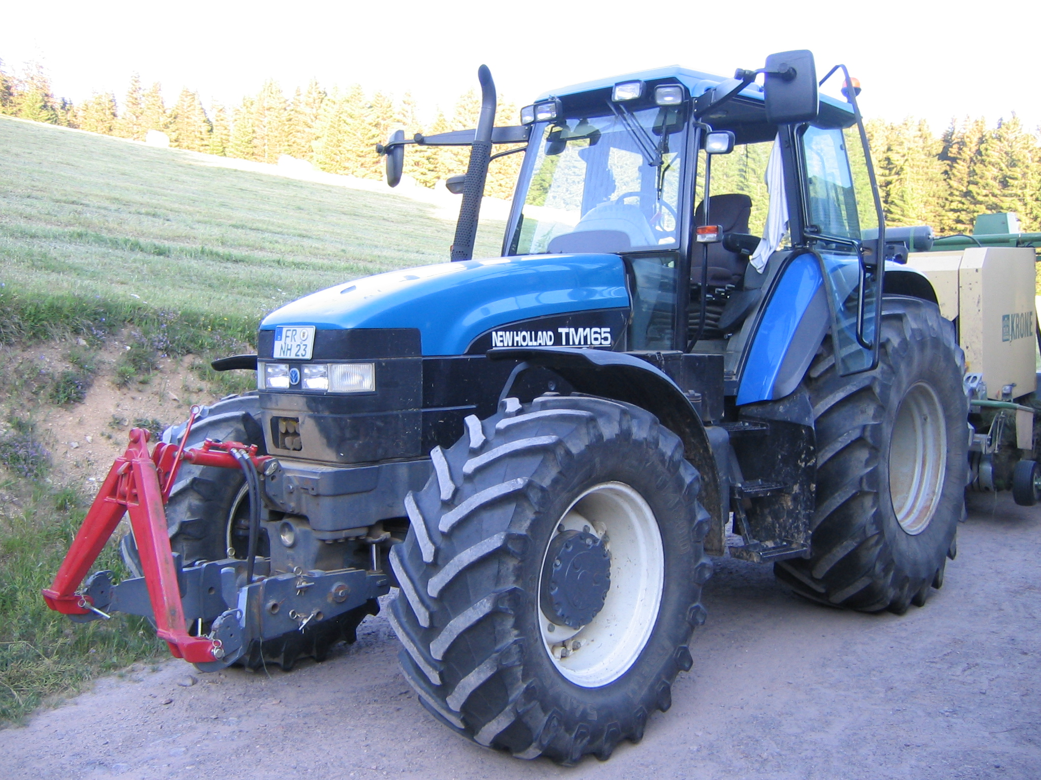 New Holland TM165 (2000–2002)